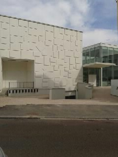 Le consortium de Dijon